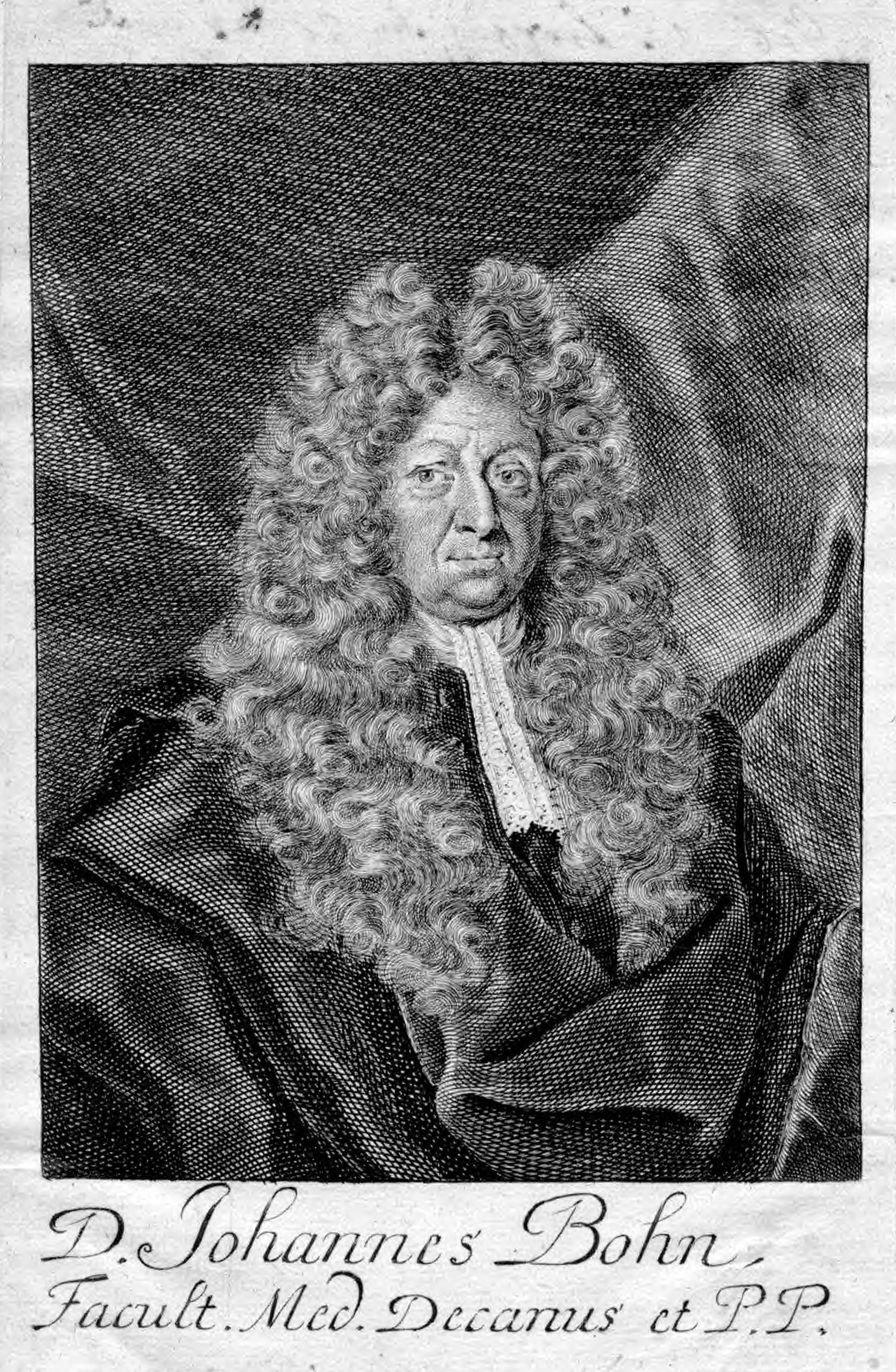 Johannes Bohn (1640–1718), deutscher Mediziner / German physician